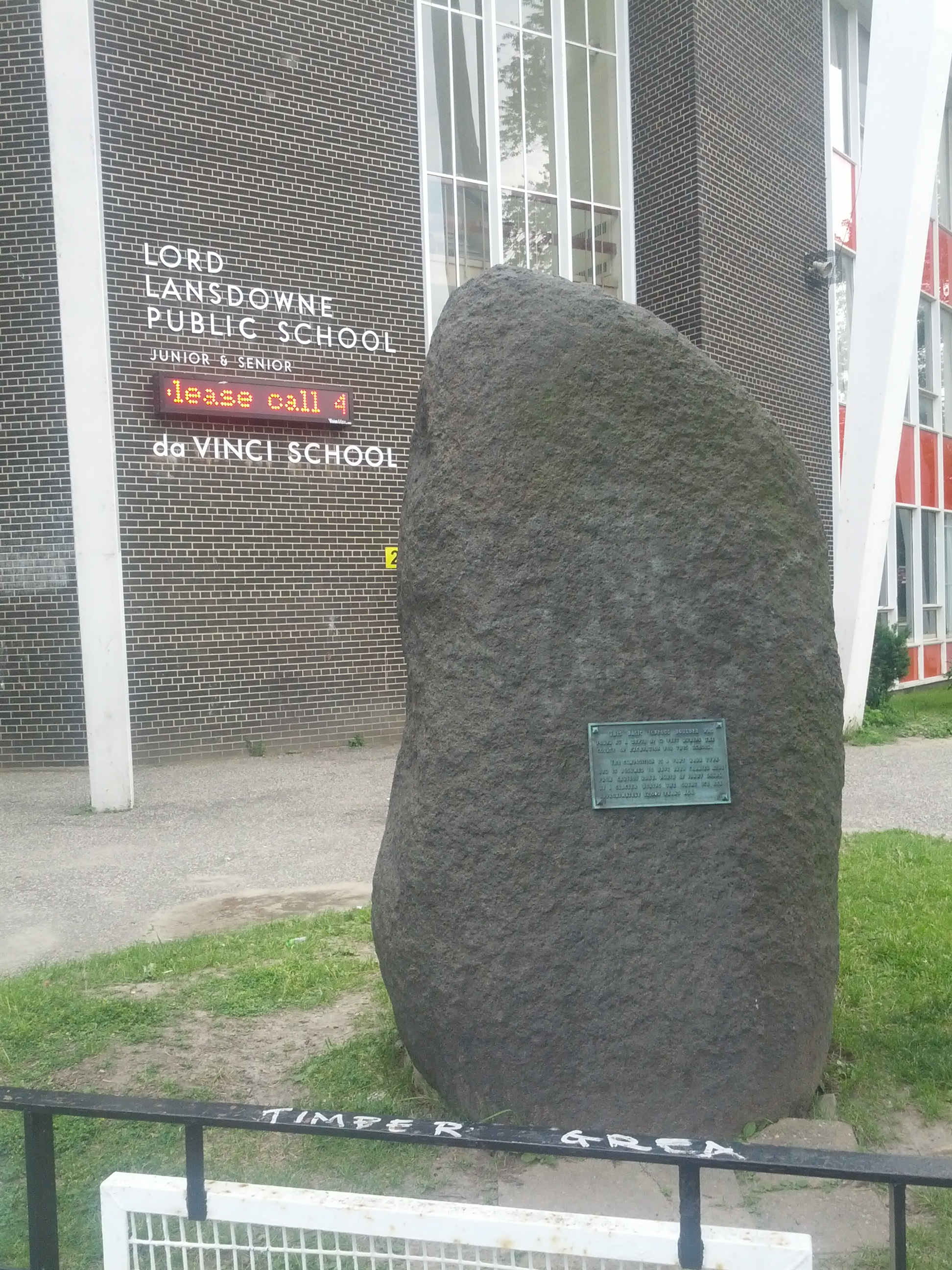 Stone at Lord Lansdowne Public School.